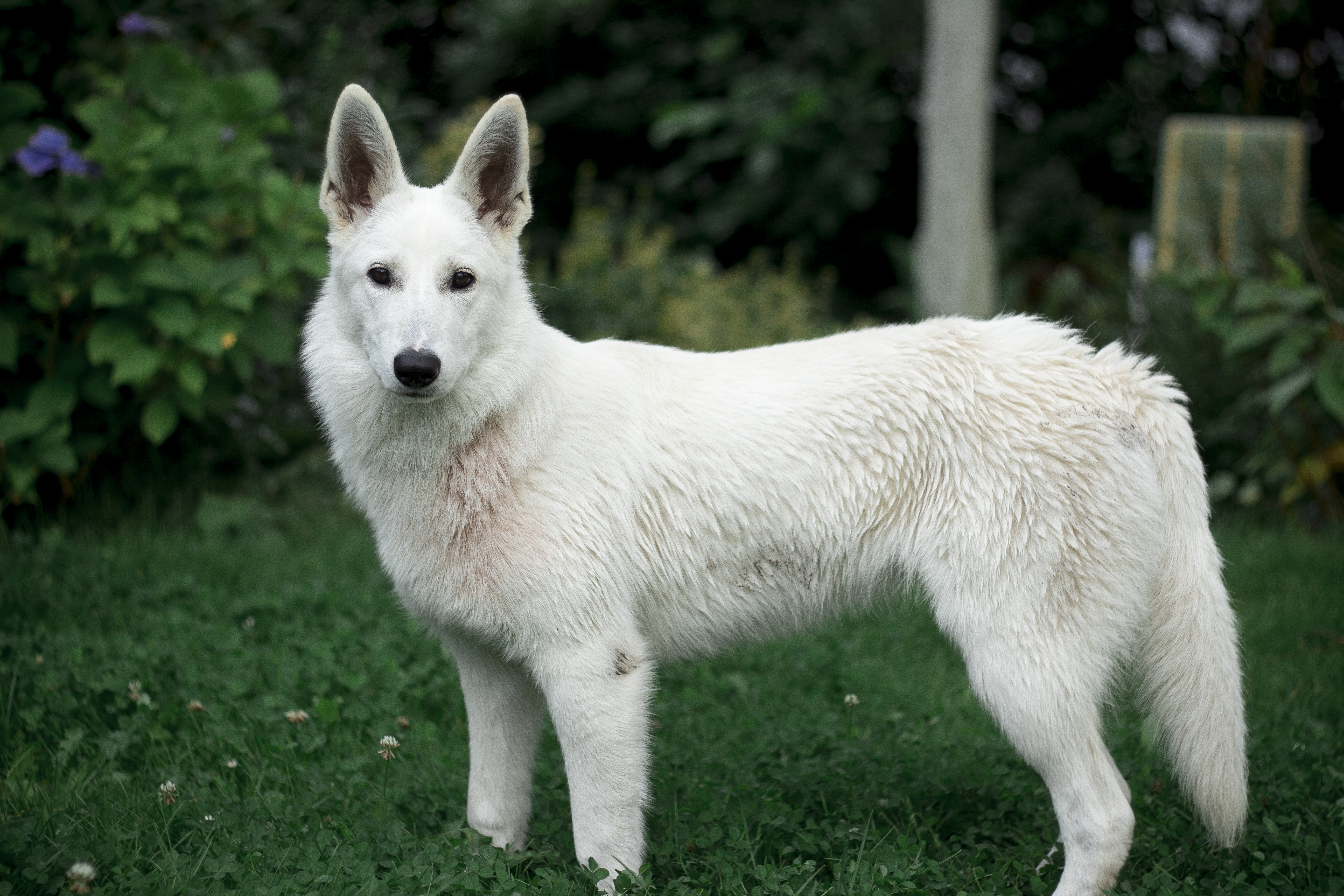 Ein einjähriger weißer Schäferhund (Weibchen).